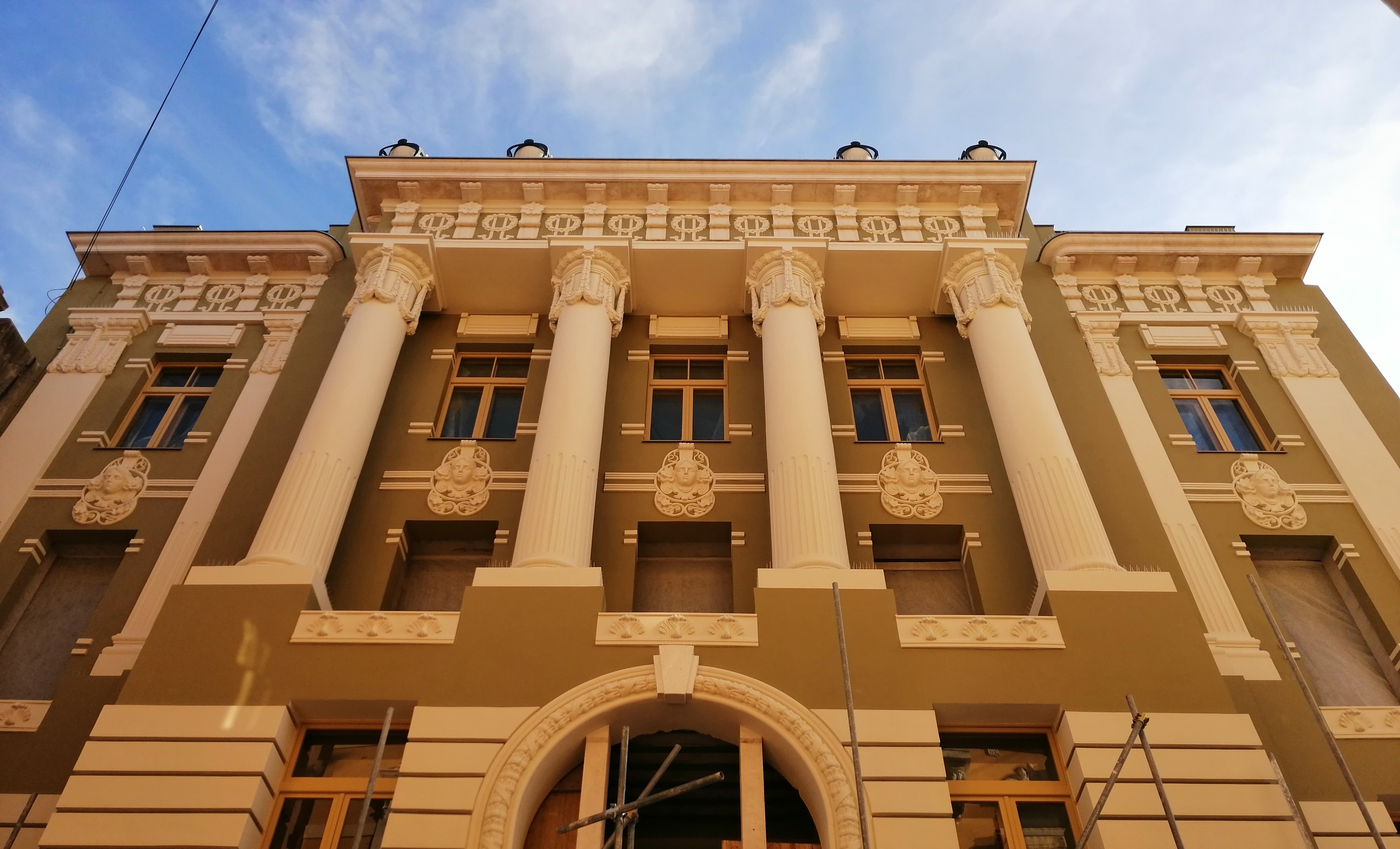 Projektirao ga je Kamilo Tončić pl. Sorinj, a izgrađen je sa svrhom da okuplja splitska narodnjačka kulturno-umjetnička i sportska društva (Narodna čitaonica, Slavjanski napredak, Narodna glazba, Dobrovoljni vatrogasci, Muzikalno društvo “Zvonimir” i “Hrvatski sokol”).